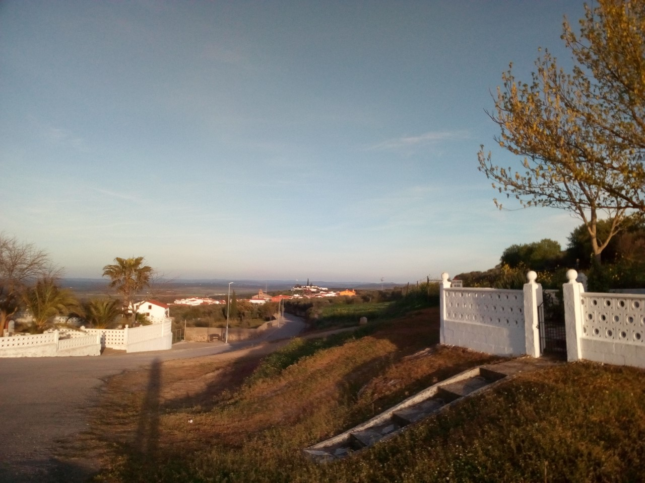 Fuente del Arco el elirejo al Jayona